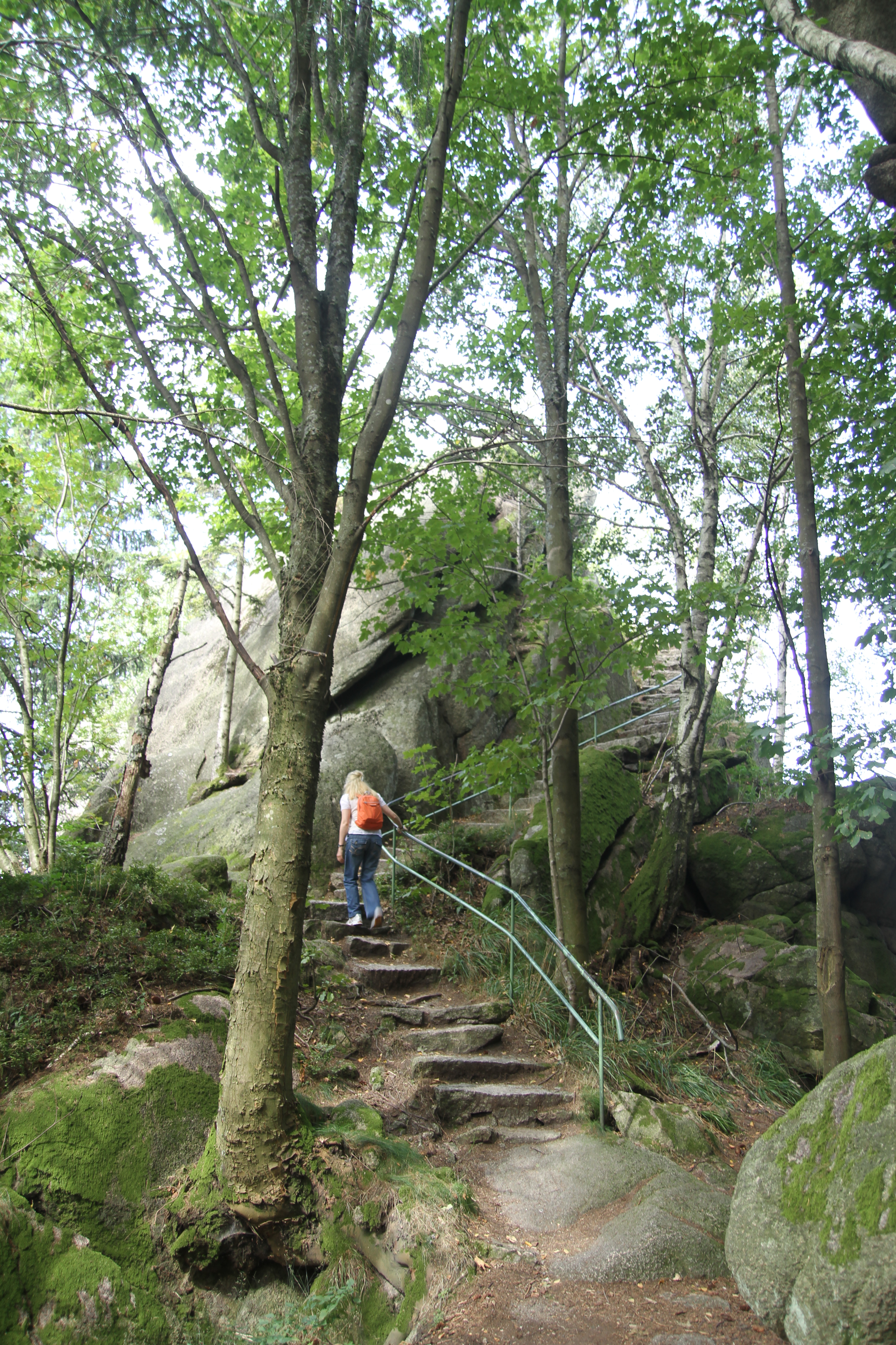 Der Wiedenfelsen ist eine Felsformation im Schwarzwald in der Nähe von Bühlertal.